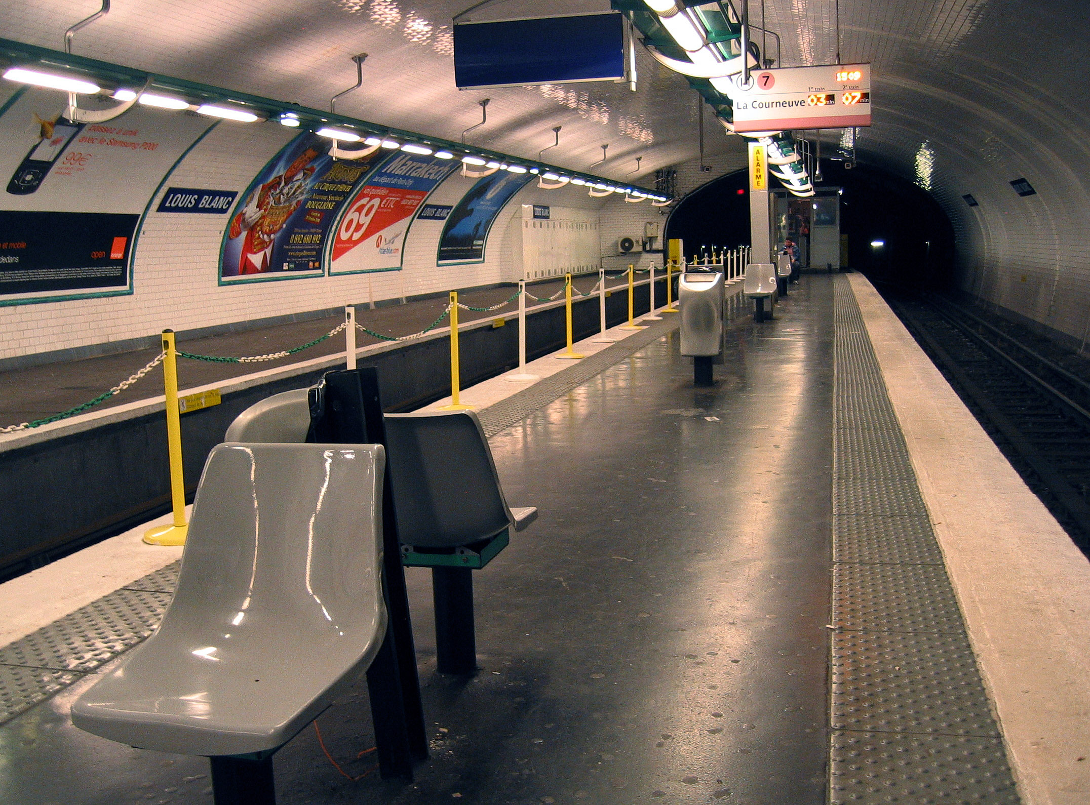 Joseph-André Motte (Français, 1925-2013): siège "Motte", RATP 1973, coque en tôle 10/20 emboutie et émaillée, Louis Blanc metro station.